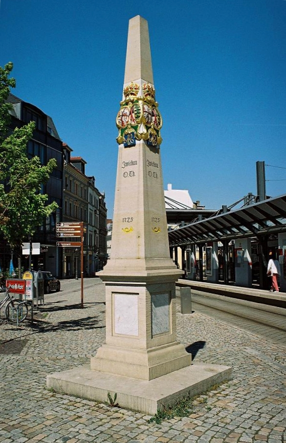 Kursächsische Postdistanzsäule Zwickau - Obertor / Innere Schneeberger Straße, Beginn der Ferienstraße Silbertraße. Standort Zwickau, Innere Schneeberger Straße.